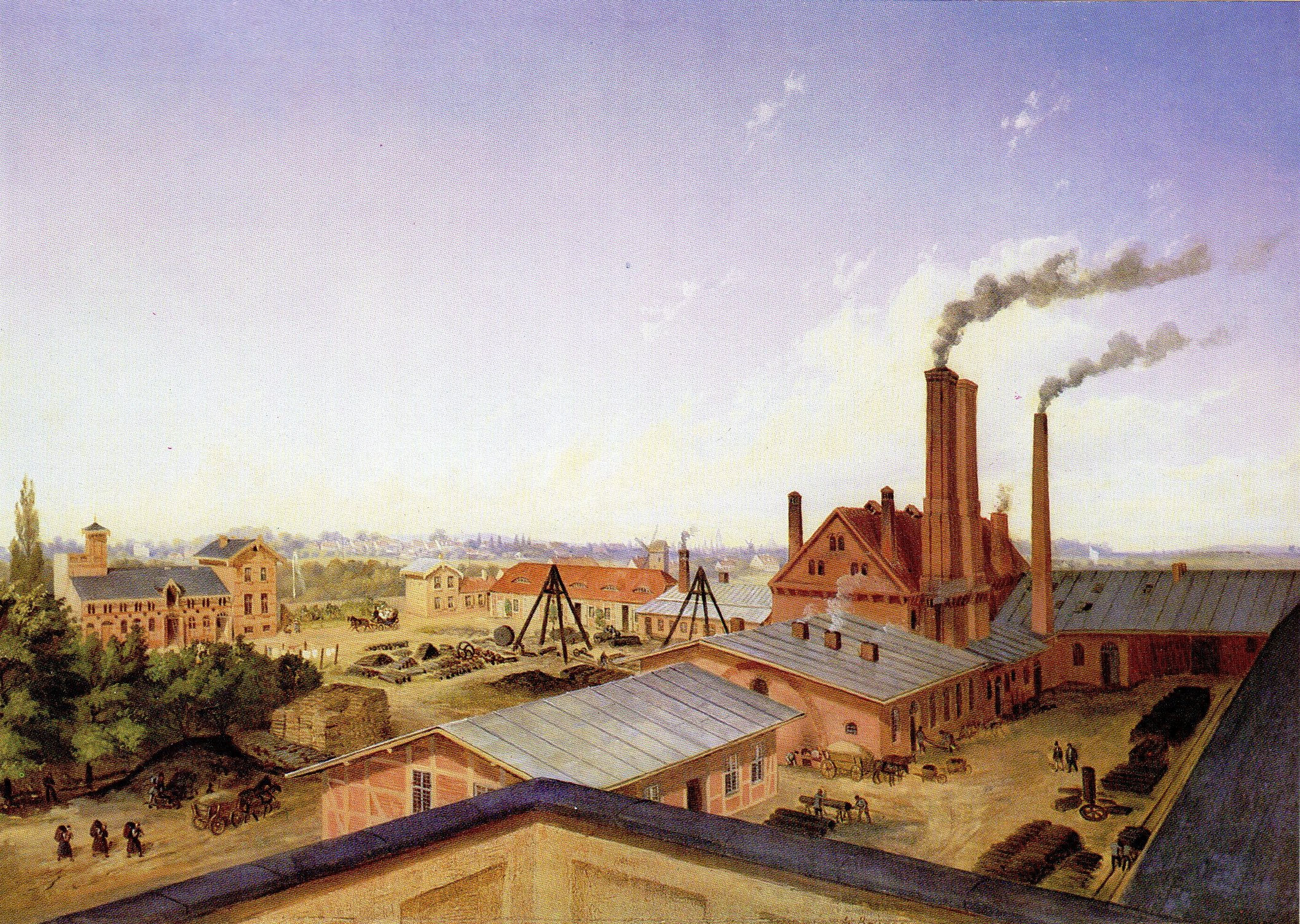 Die Freund'sche Maschinenfabrik in Charlottenburg, Ölgemälde